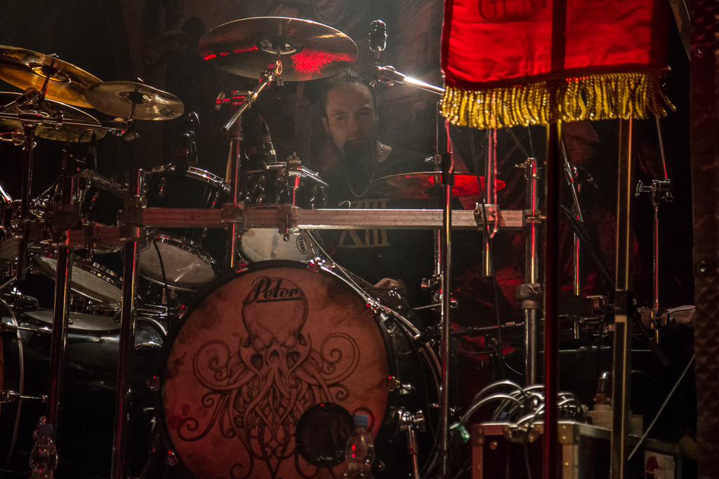 Ex Deo - Paganfest 2013 Wuerzburg - 01-03-2013